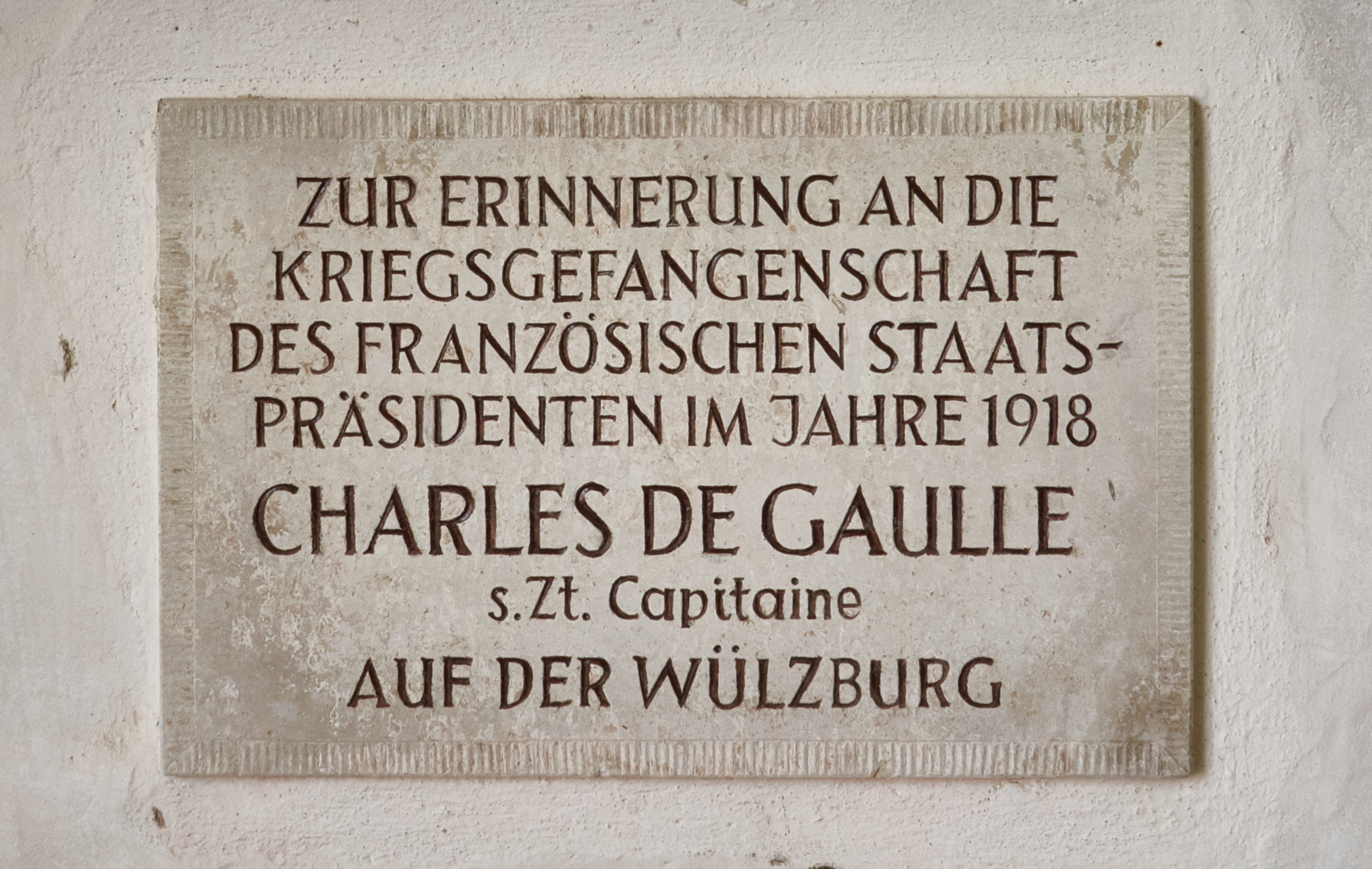 Gedenktafel im Eingangsgewölbe für den auf der Wülzburg als Kriegsgefangener internierten Charles de Gaulle